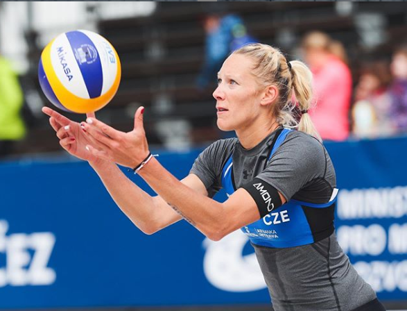 Michala Kvapilová, česká reprezentantka ve volejbalu a plážovém volejbalu. Vicemistryně Evropy 2017